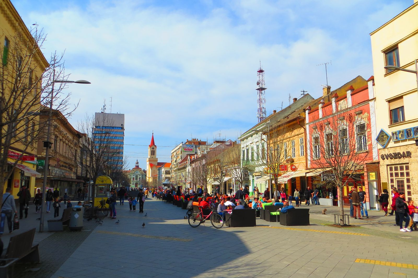 Centar, Zrenjanin, Serbia